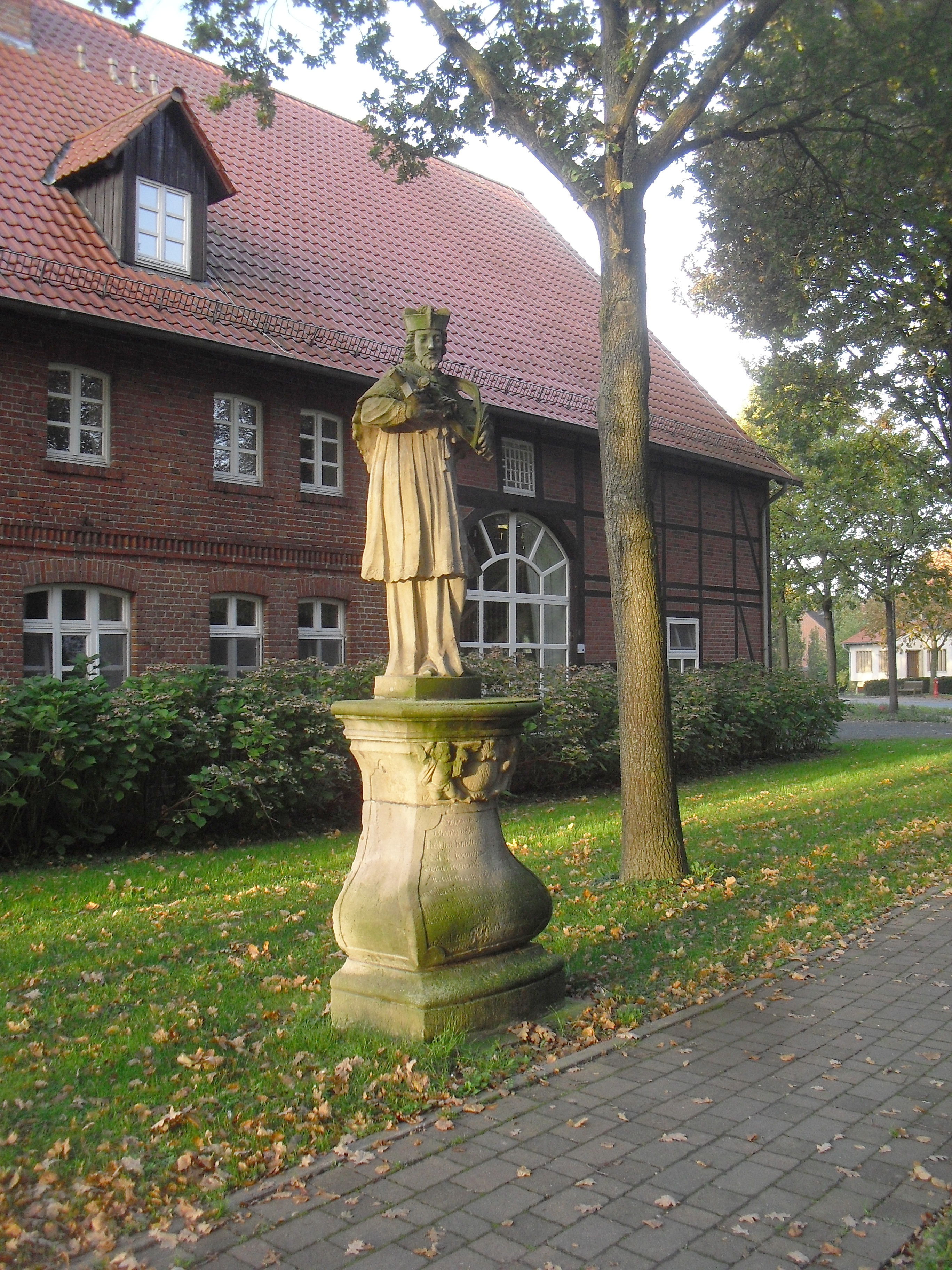 Nepomukstatue in Thüle This is a photograph of an architectural monument.